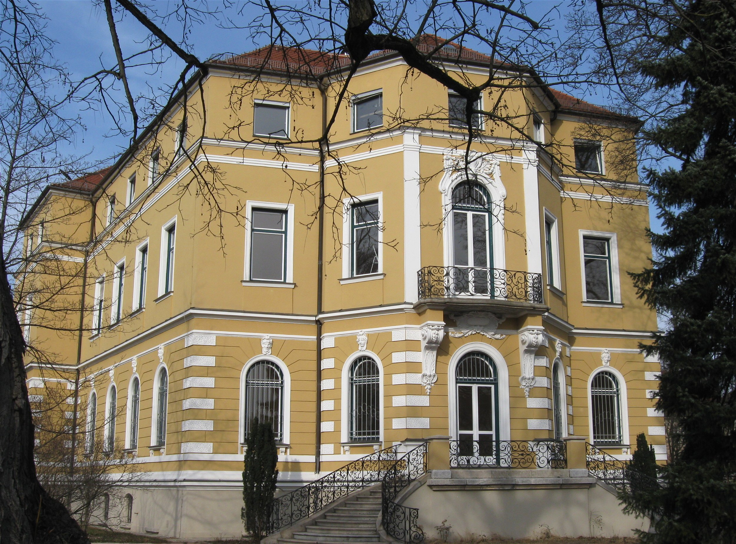 Maria-Theresia-Straße 17; Villa, derzeit (2011) Generalkonsulat der Russischen Föderation, dreigeschossiger putzgegliederter Neubarock-Eckbau mit Risaliten und Stuckdekor, von M. Schulze, um 1894; Nebengebäude, zweigeschossiger putzgegliederter Neubarockbau mit Mittel- und Seitenpavillons, um 1894; Einfriedung, Pfeilergitterzaun mit Torpfeilern, um 1894